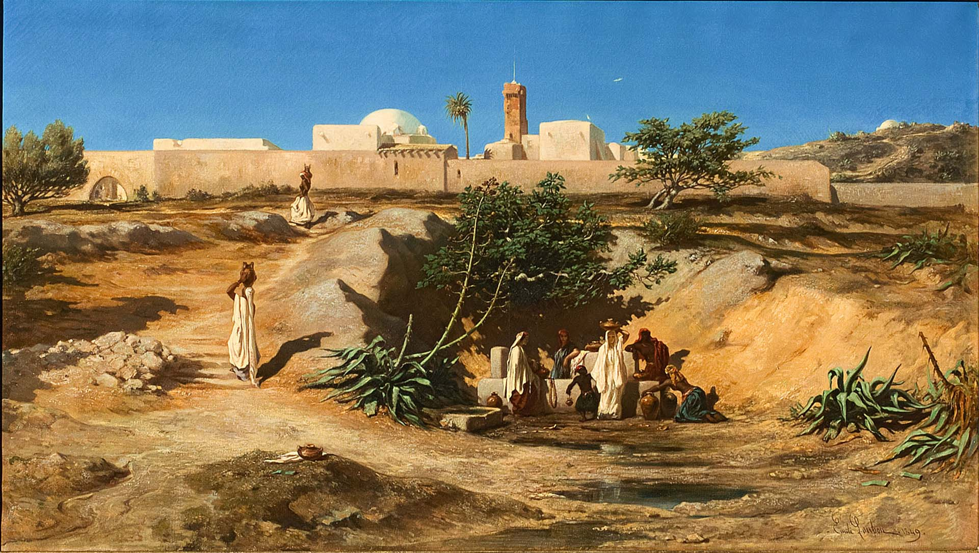 Tableau d'émile Loubon (1809-1863) représentant Nazareth.